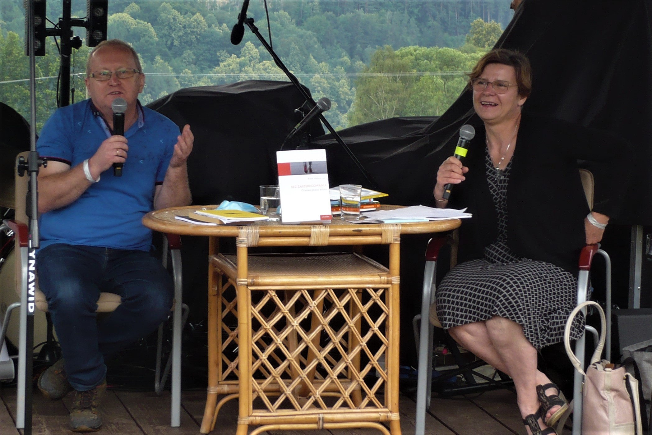 Karol Maliszewski, , VI Festiwal Góry Literatury, Włodowice, Pod Wiatami, 18.07.2020